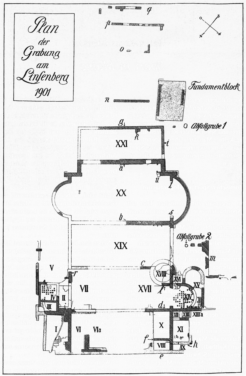 Plan der Ausgrabungen des Kastellbades des Legionslagers von 1901. Legende: VIa: Apodyterium (Umkleideraum), XIX: Tepidarium (Schwitzbad), XX: Caldarium (Warmbad).